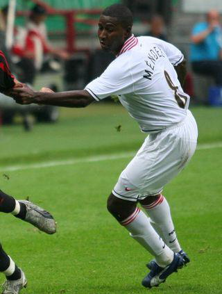 Edison Mendez